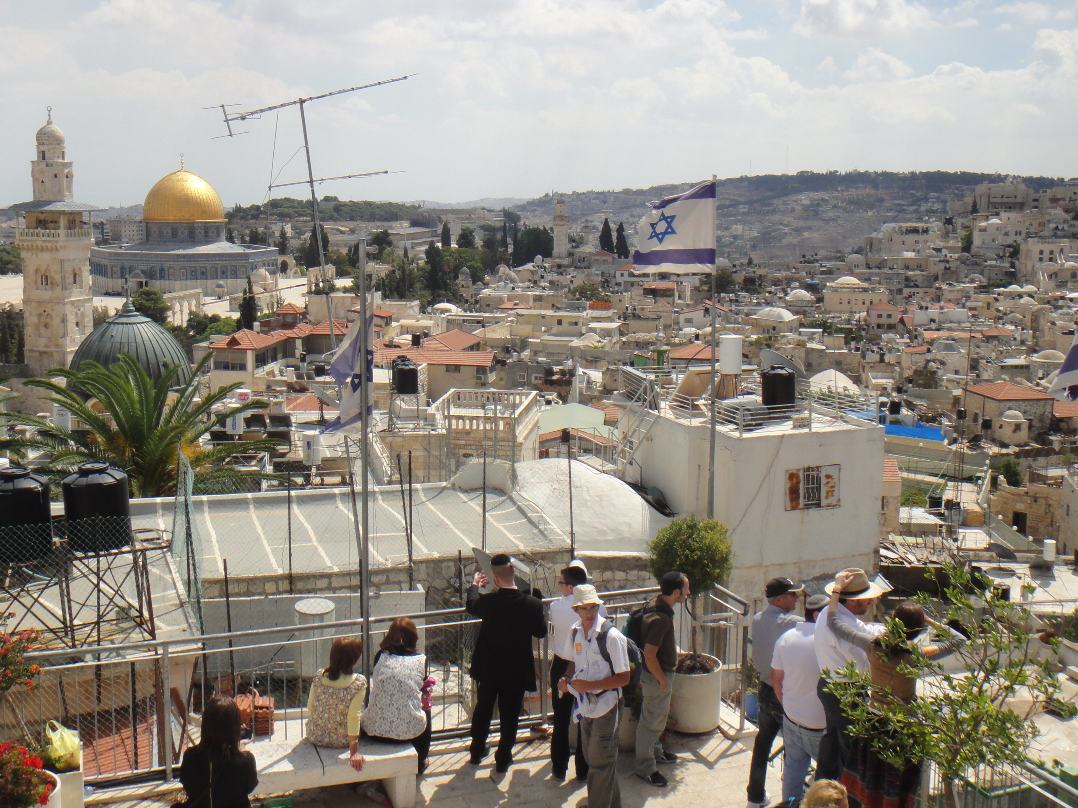 נוף נבית הצלם